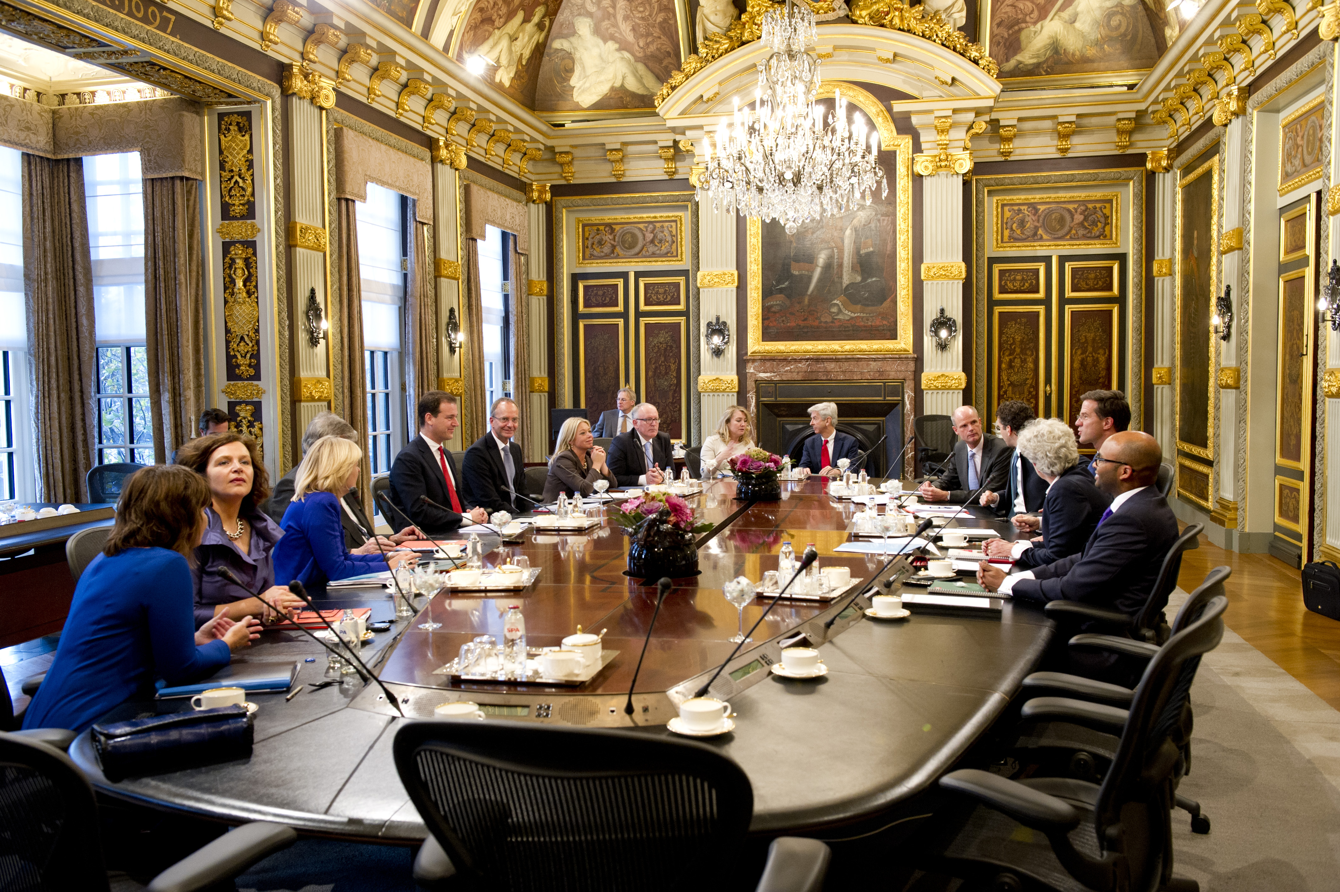 De eerste vergadering van de ministerraad in nieuwe samenstelling.